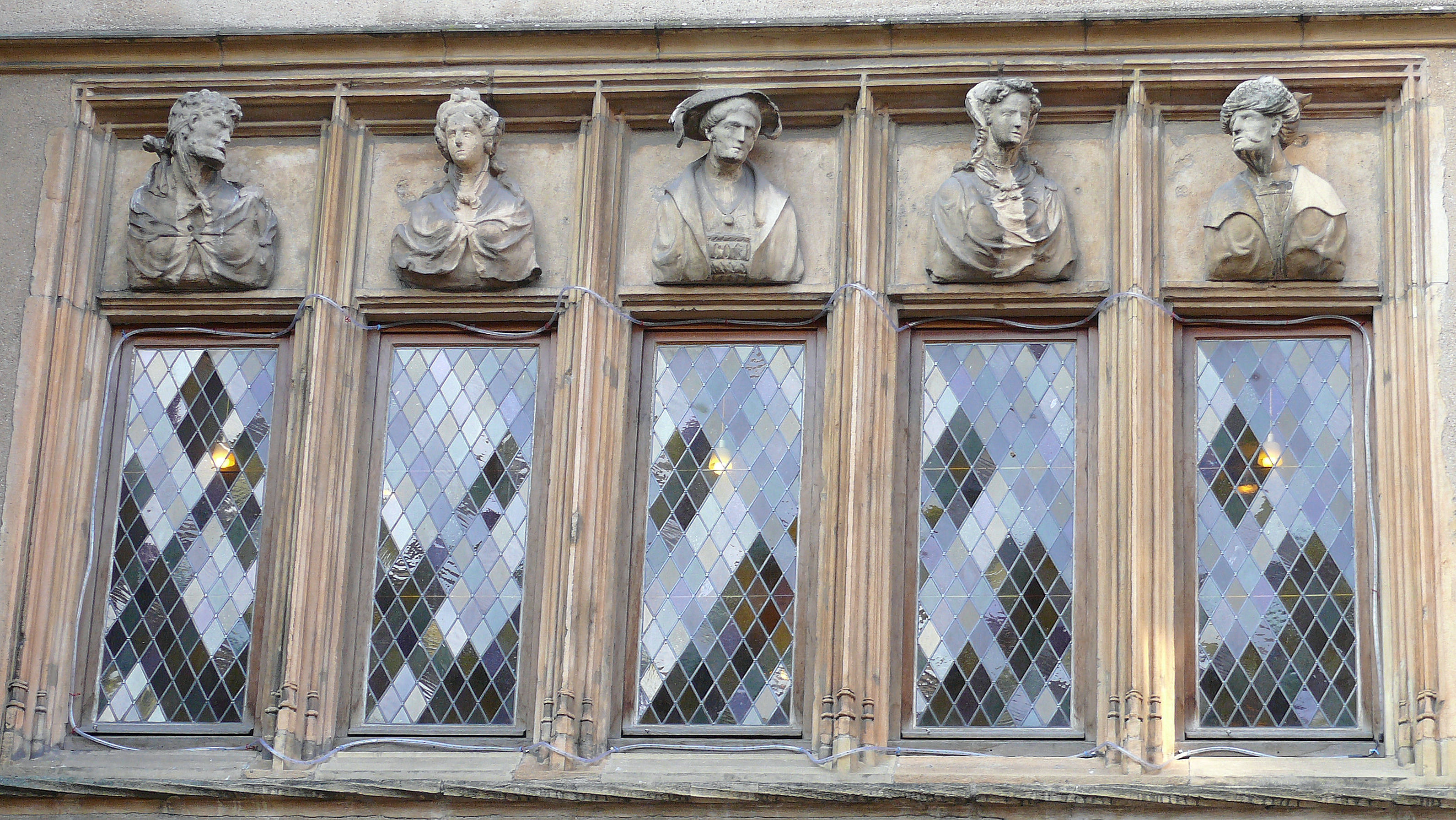 Metz - Maison des Têtes - Tympans portant des têtes, copies des originaux vendus en 1913 puis récupérés par le Musée de Metz pour 4 d'entre elles